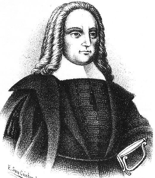 Carmine Nicolao Caracciolo, quinto principe di Santo Buono, Grandezza di Spagna (Bucchianico, 6 luglio 1671 – Madrid, 26 luglio 1726), viceré spagnolo del Perù tra il 5 ottobre 1716 ed il 26 gennaio 1720.